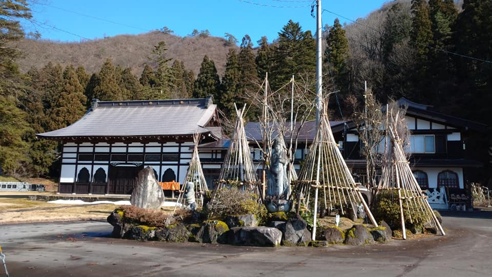 永昌庵 2020-01-11